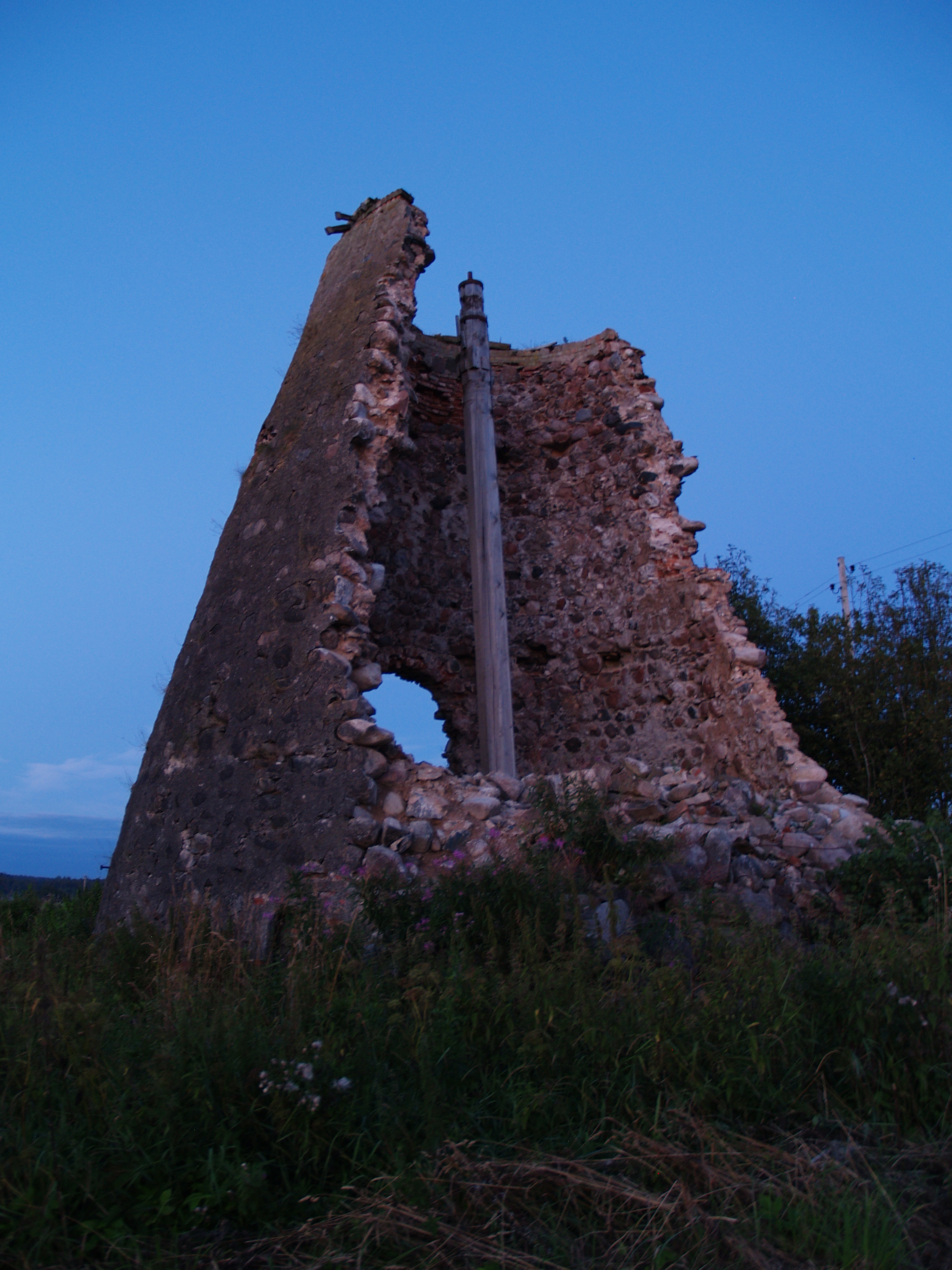 Lagunenud veski Ipiku külas